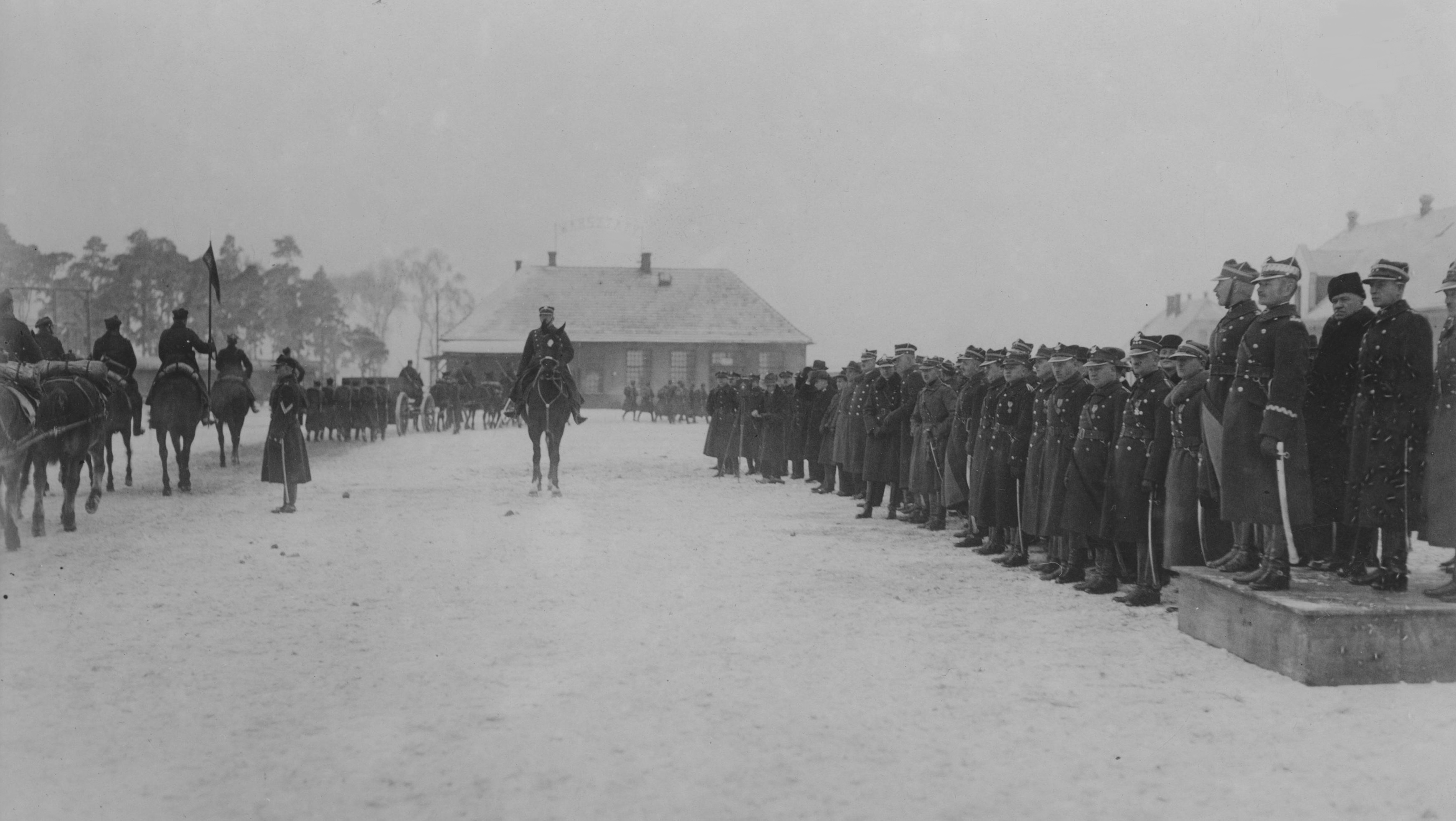 X - lecie 7 Pułku Artylerii Ciężkiej w Poznaniu; 1931 r. Defilada baterii nierozpoznanych dział przed gen. dyw. Kazimierzem Dzierżanowskim (czwarty z prawej). Koncern Ilustrowany Kurier Codzienny - Archiwum Ilustracji. Sygnatura: 1-W-1527-2